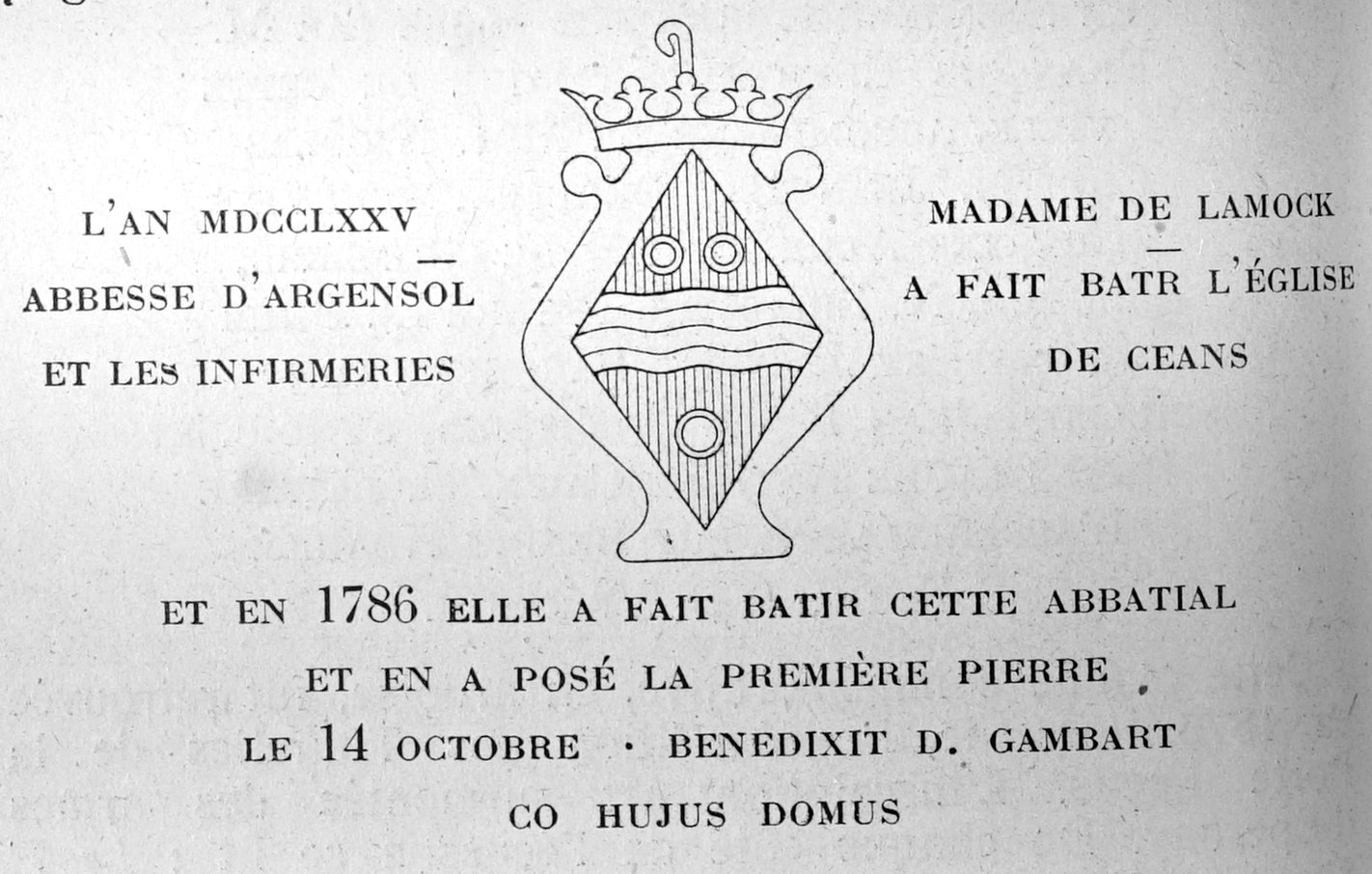 publié en 1923 dans l'almanach matot-Braine.